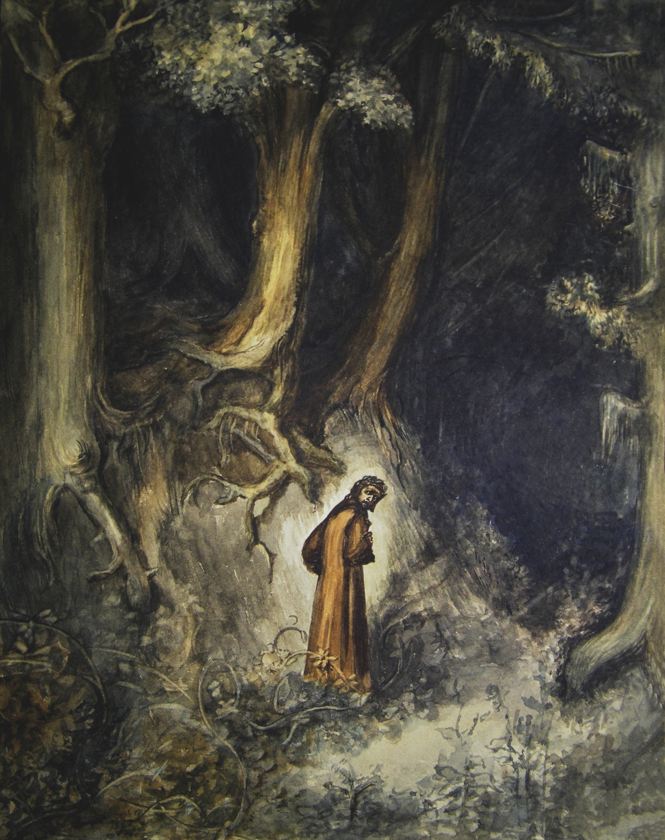 Dante perdu dans la forêt obscure entre en enfer. L'Enfer de Dante Alighieri Chant 1 illustré par Gustave Doré en 1861. Gouache d'époque attribué à Gustave Doré. Gouache vendue vers 1865 au Canada dans une galerie d'art (Thompson's Art Store 68 & 70 King Street East HAMILTON.) Cadre d'epoque, etiquette de la galerie.